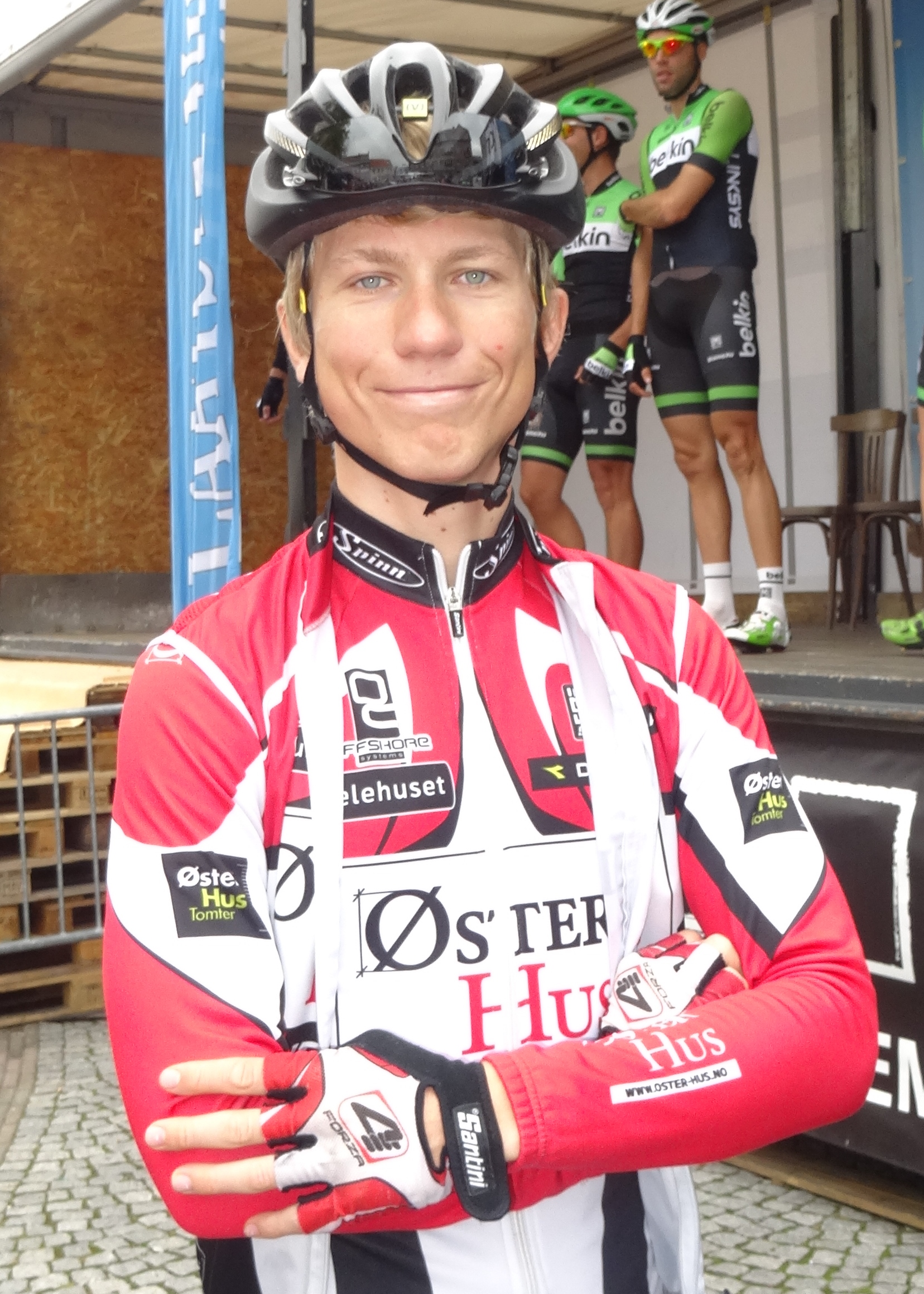 Reportage photographique réalisé le mercredi 27 août à l'occasion du départ de la Druivenkoers Overijse 2014 à Huldenberg, Belgique.